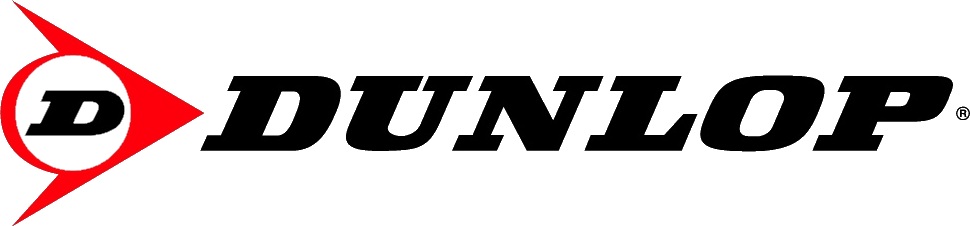 Hecho exclusivamente para completar datos